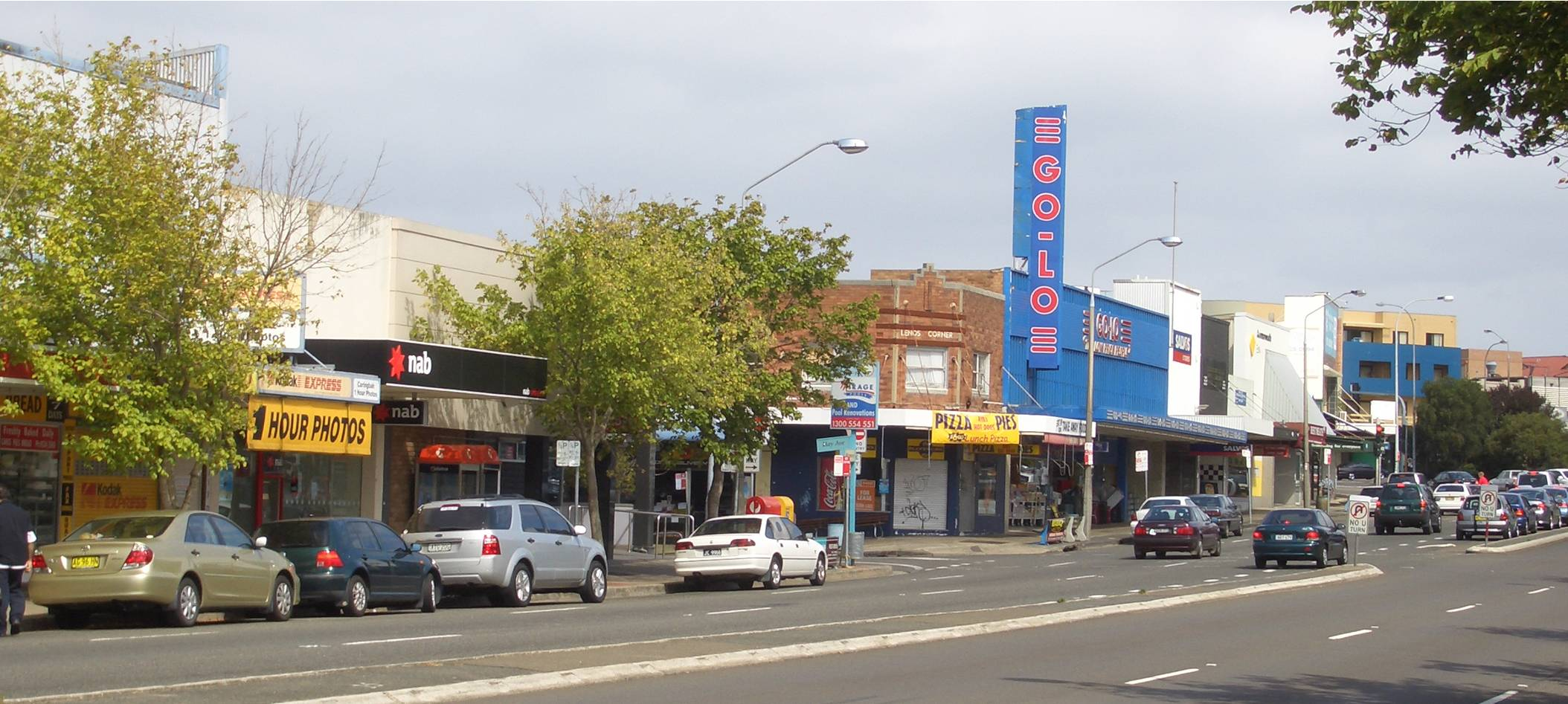 Caringbah